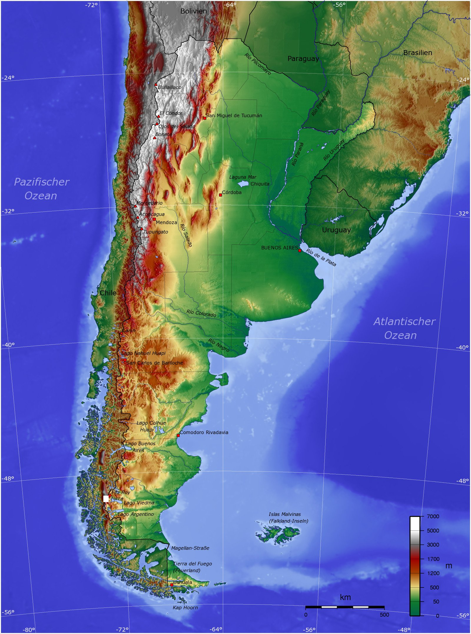 Topografische Karte von Argentinien